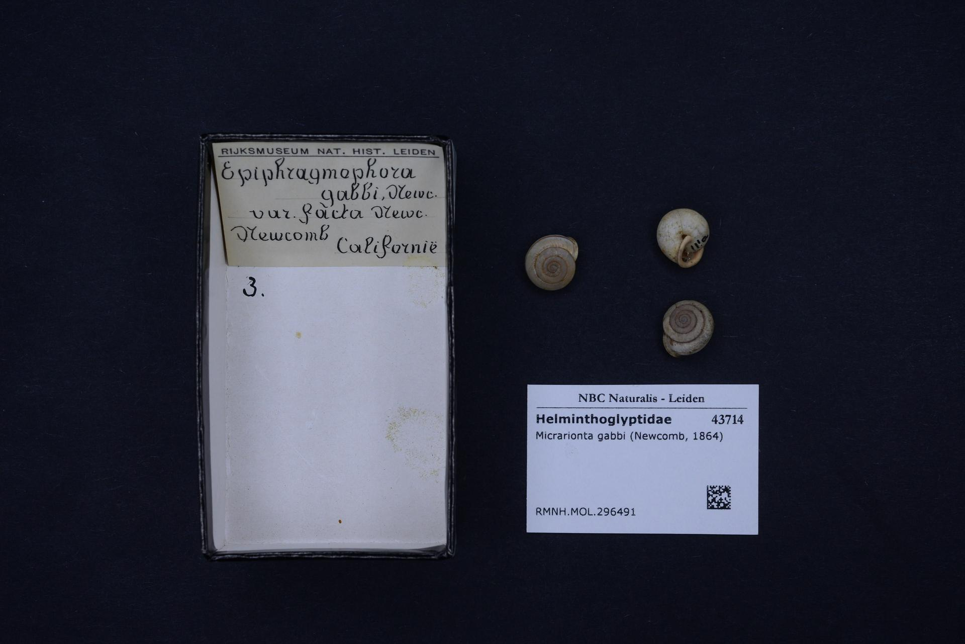 Micrarionta gabbi (Newcomb, 1864)